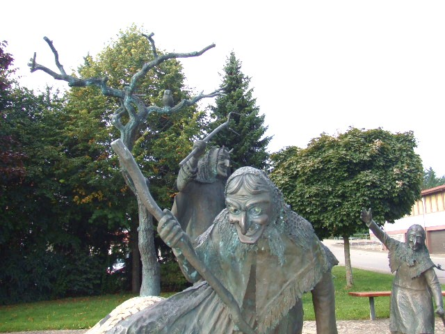 Obernheim, Zollernalbkreis, Baden-Württemberg Denkmal der Obernheimer Narrenzunft, mit lebensgroßen Figuren aus Bronze am nördlichen Ortsrand.